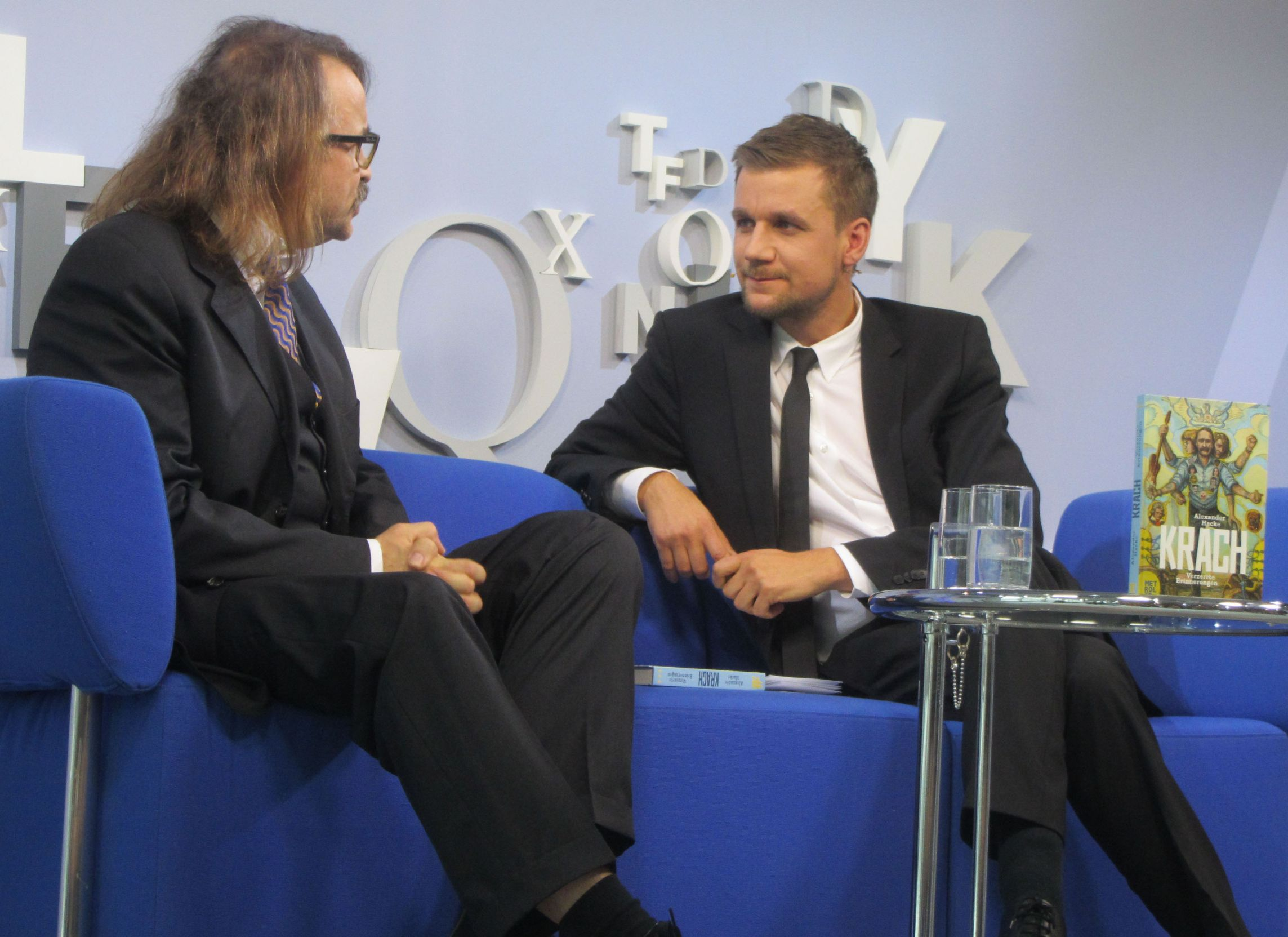 Moderator Tobias Schlegl (re.) im Interview mit Musiker Alexander Hacke (li.) auf dem Blauen Sofa auf der Frankfurter Buchmesse, wo Hacke seine Autobiographie Krach - Verzerrte Erinnerungen (Metrolit Verlag) vorstellte